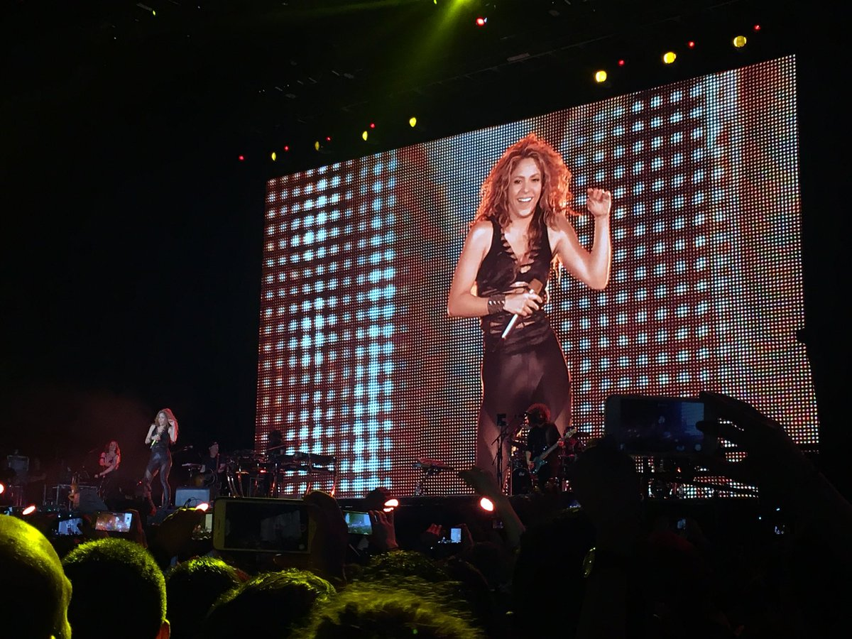 Fotografía tomada a Shakira durante El Dorado World Tour al cual asistí en la ciudad de Bogotá, CO